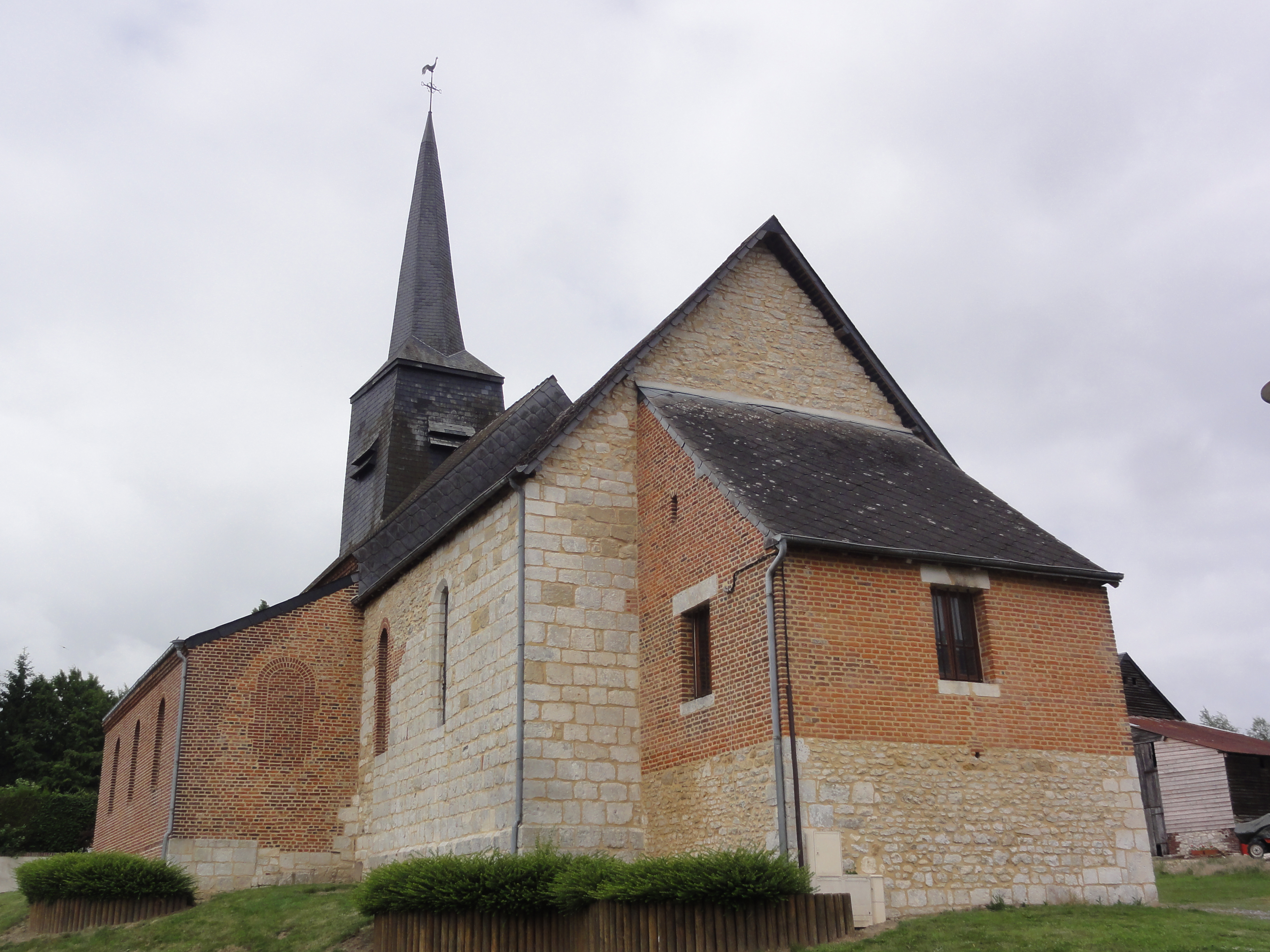 Beaumé (Aisne) église